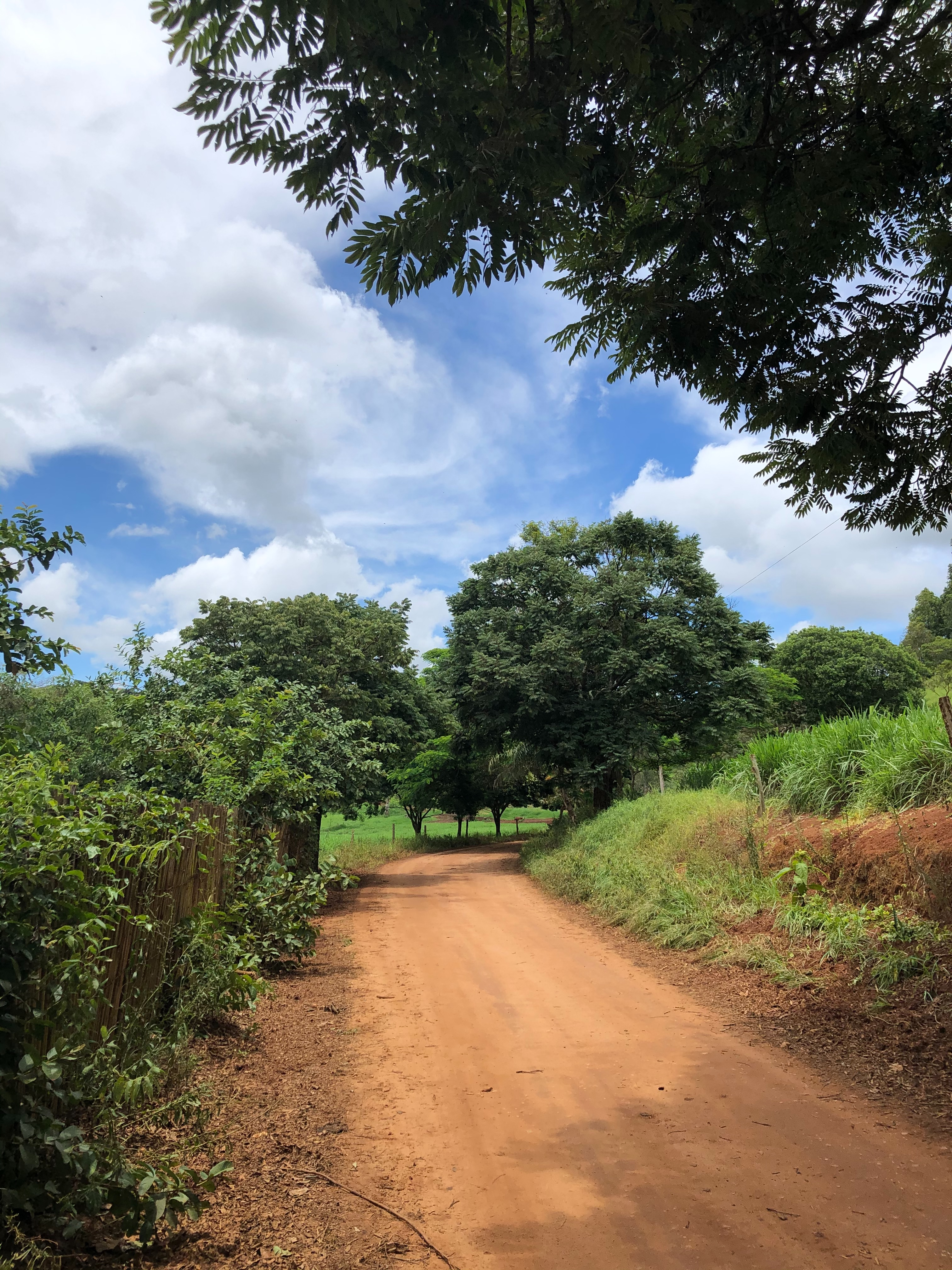 مشاهد من ضواحي مدينة باراغواصو في ولاية ميناس جرايس البرازيلية